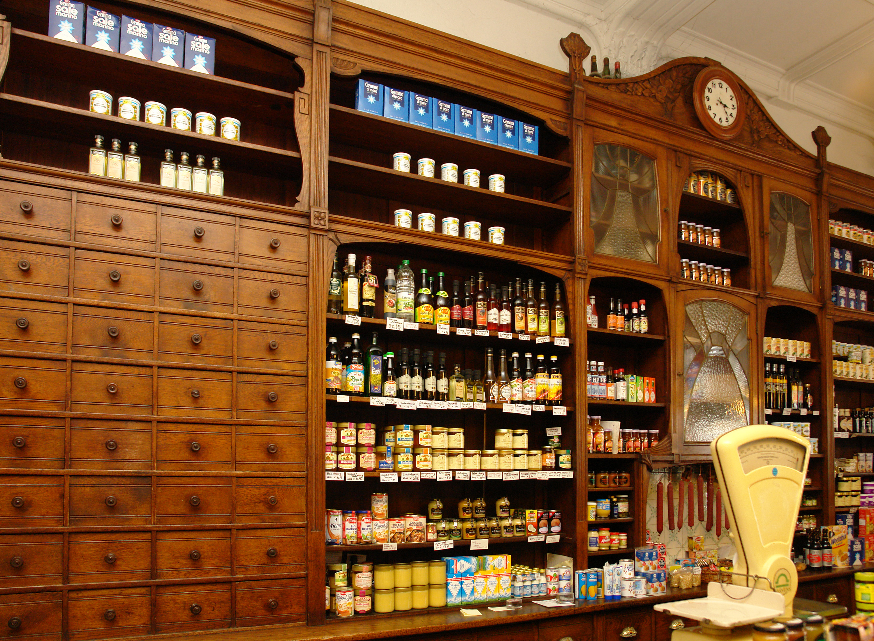 Feinkostgeschäft Wilh. Holtorf in Bremen, Ostertorsteinweg 6Das abgebildete Objekt ist ein geschütztes Kulturdenkmal in der Freien Hansestadt Bremen, mit der Nr. 0972 beim Landesamt für Denkmalpflege registriert.